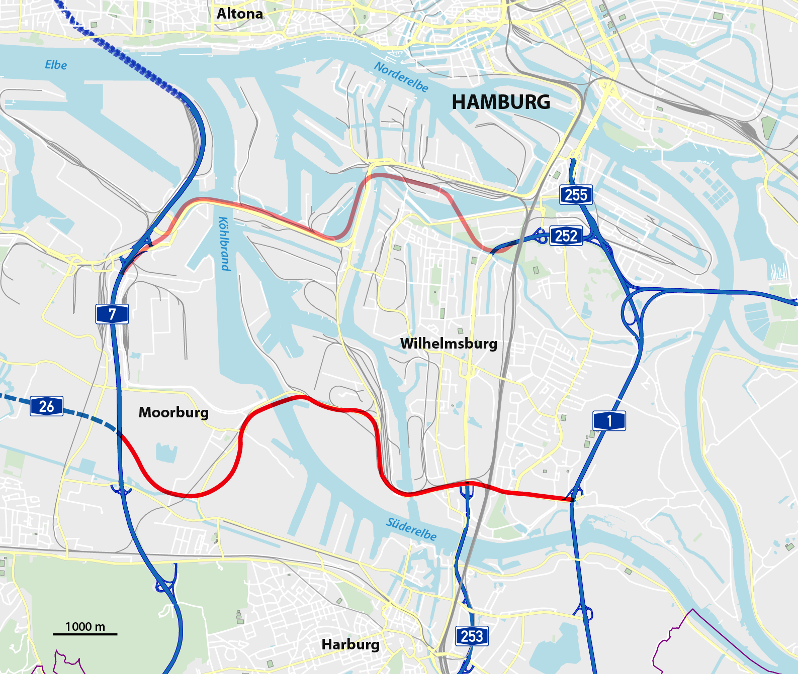 Karte der Hafenquerspange in Hamburg; dunkelrot: aktuelle Planung; hellrot: alte Planung This map may be incomplete, and may contain errors. Don't rely solely on it for navigation.